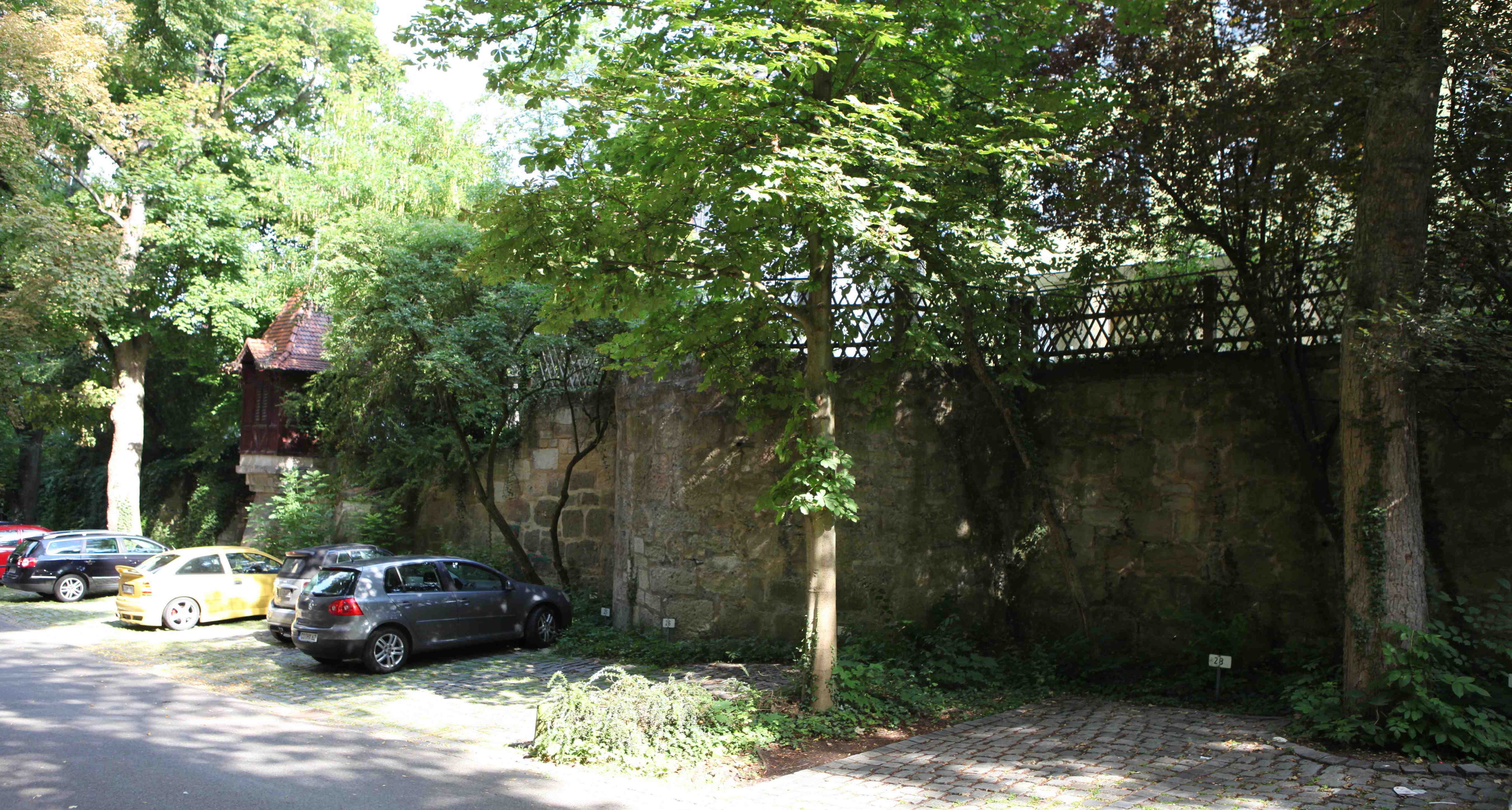 Zwingermauer in der Unteren Anlage, Rückseite Gymnasiumgasse 5 in Coburg